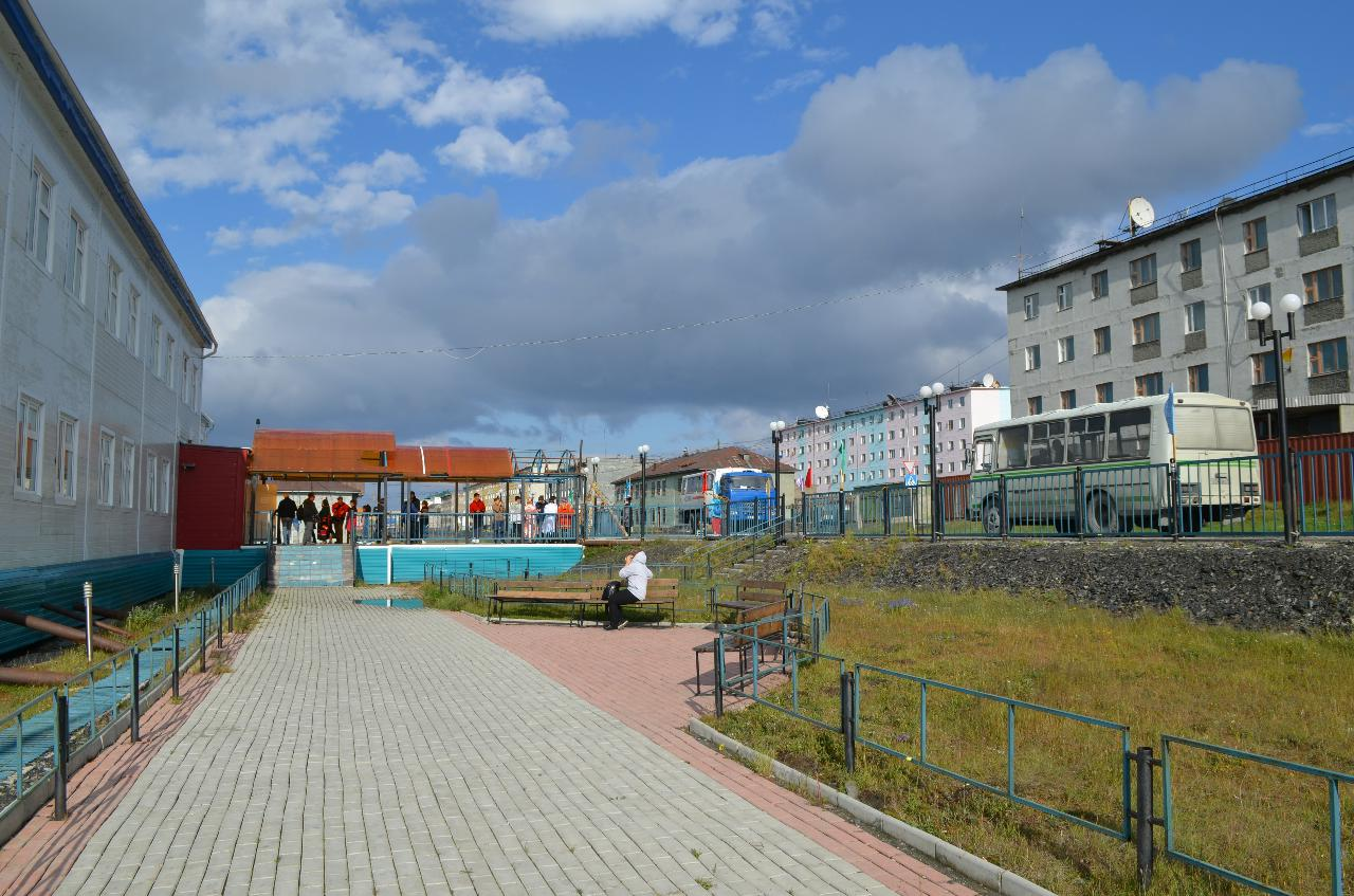 Тикси. Ул. Ленинская рядом с культурно-спортивным комплексом